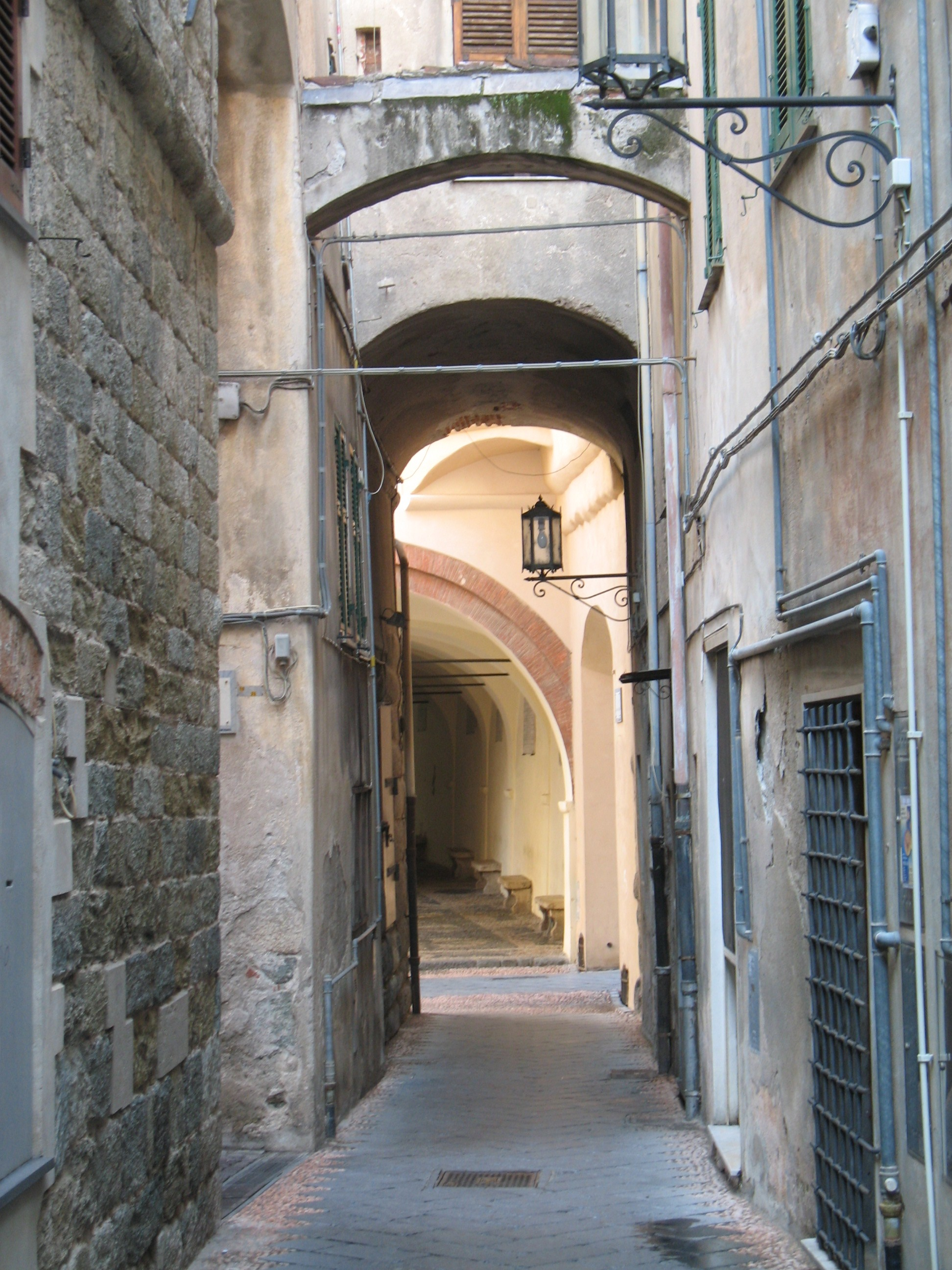 Serie di Immagini da Noli in provincia di Savona